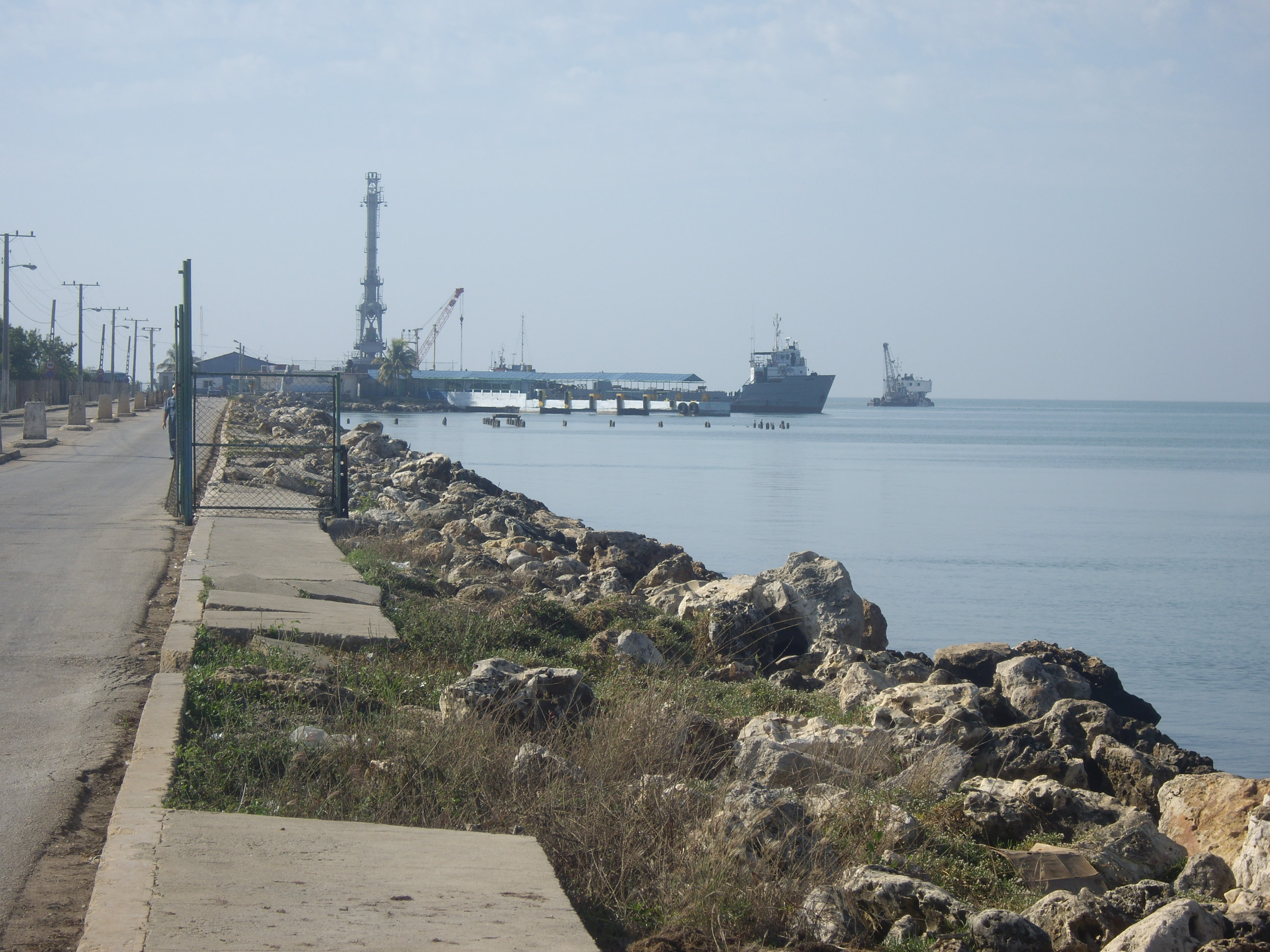 Estació marítima a Surgidero de Batabanó